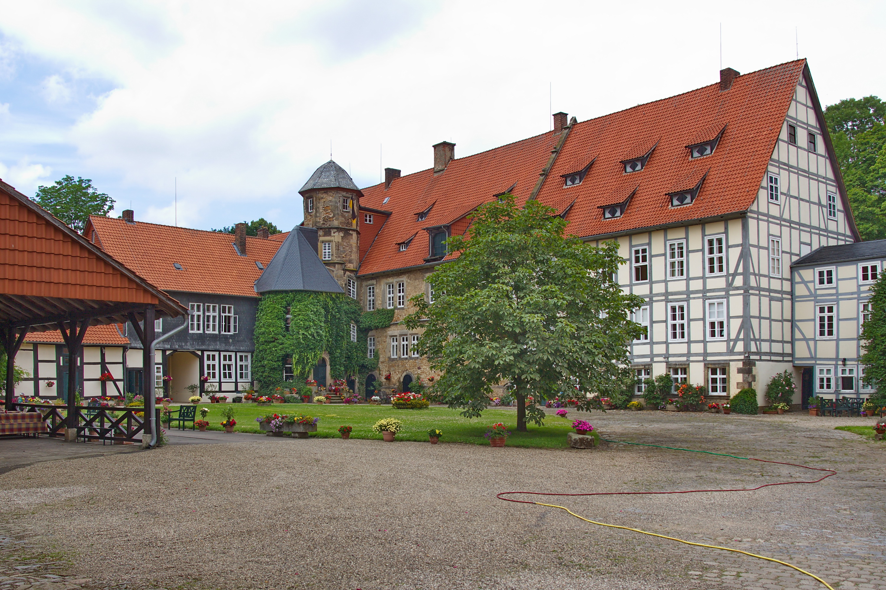 Wasserschloss Münchhausen (1560–61 durch die Eheleute Börries von Münchhausen) in Apelern, Niedersachsen, Deutschland